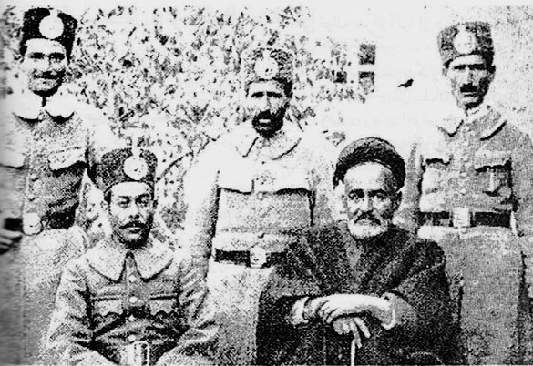 سید اشرف‌الدین قزوینی (یا حسینی یا گیلانی)